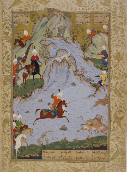 Sultan Məhəmməd - Bəhram Gurun şir ovu, 1539 - 1543, Britaniya Milli Kitabxanası